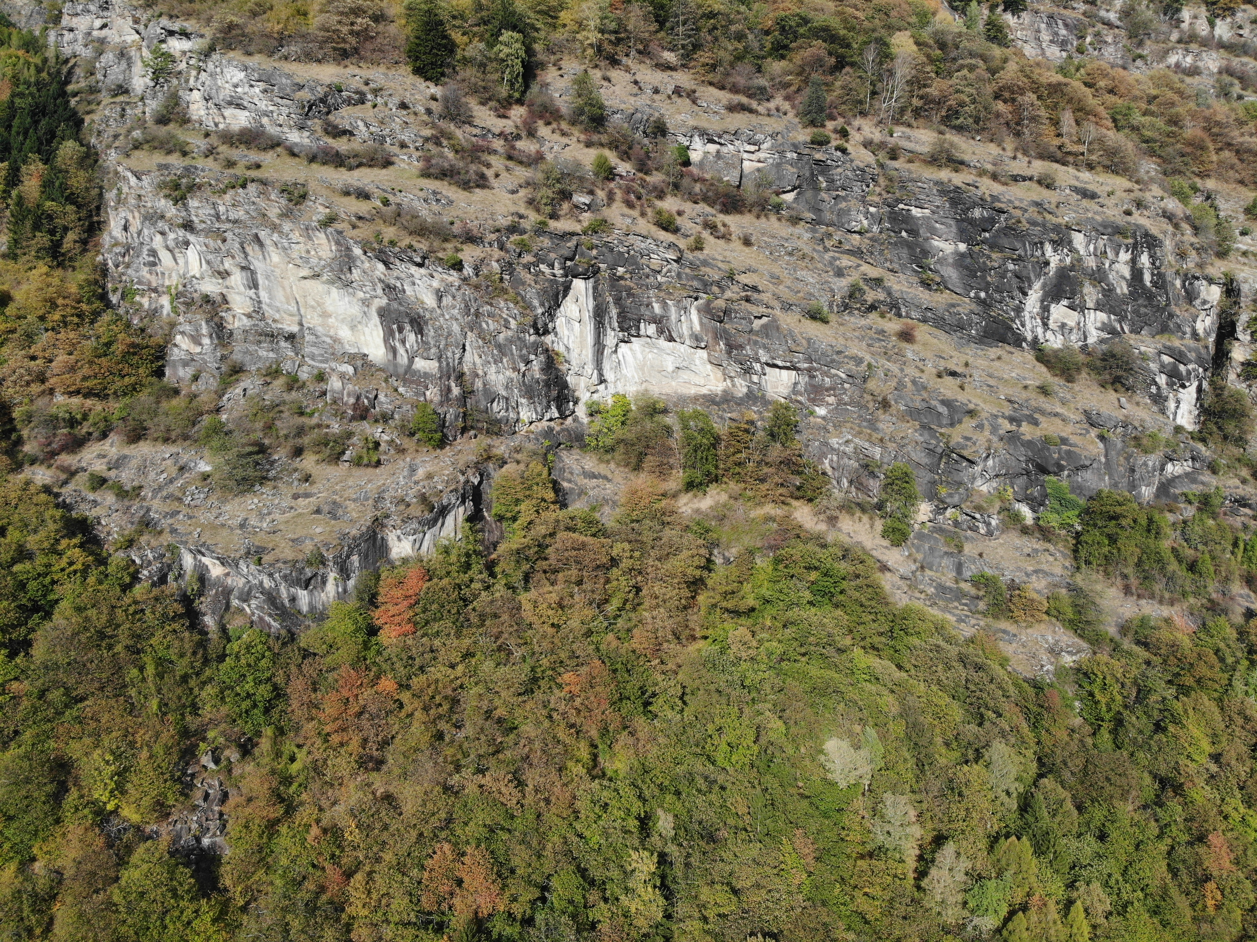 Case dei Pagani Die Ruinen unterhalb der weissen Felswand. Ansicht von Südwesten